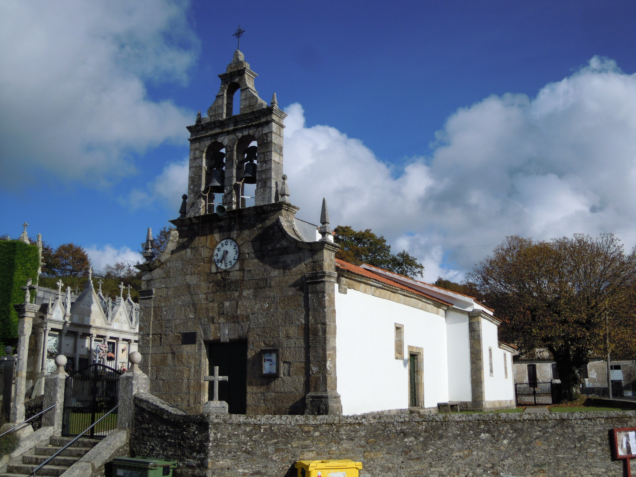 Igrexa parroquial de Lebozán (Beariz).